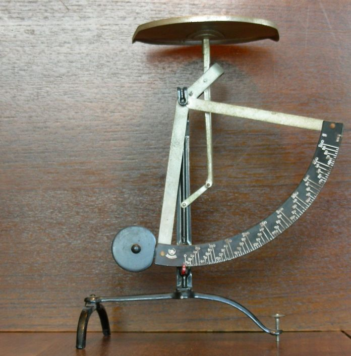 Historische Briefwaage-Neigungswaage